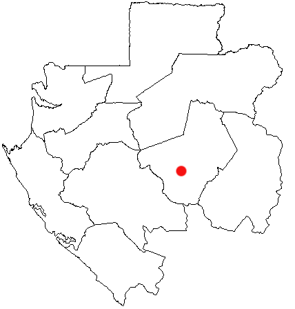 Разположение на Кула Муту в Габон.